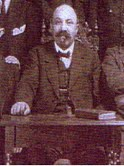 Yankev-Meyer Zalkind